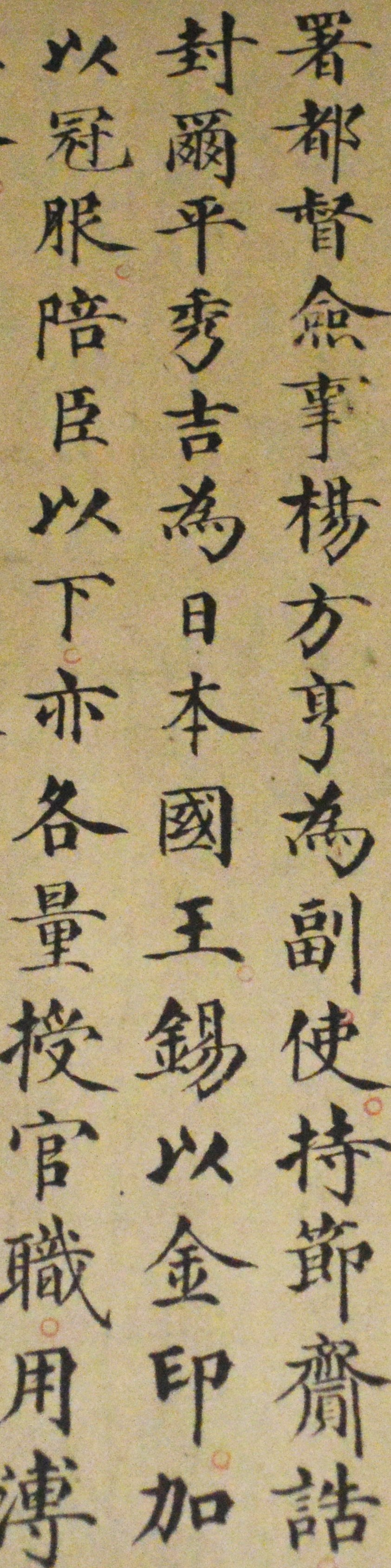 明皇帝勅諭 (複製) 日本国王部分抜粋 中文（中国大陆）: 日本國立歷史民俗博物館藏品展示。明万暦帝冊封豊臣秀吉為日本國王一文。